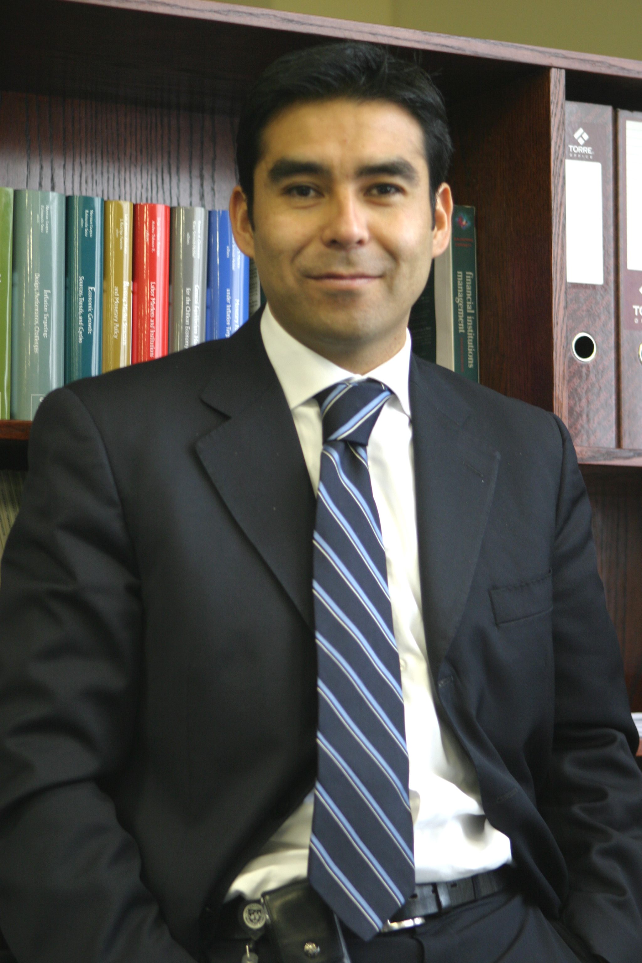 Eric Parrado